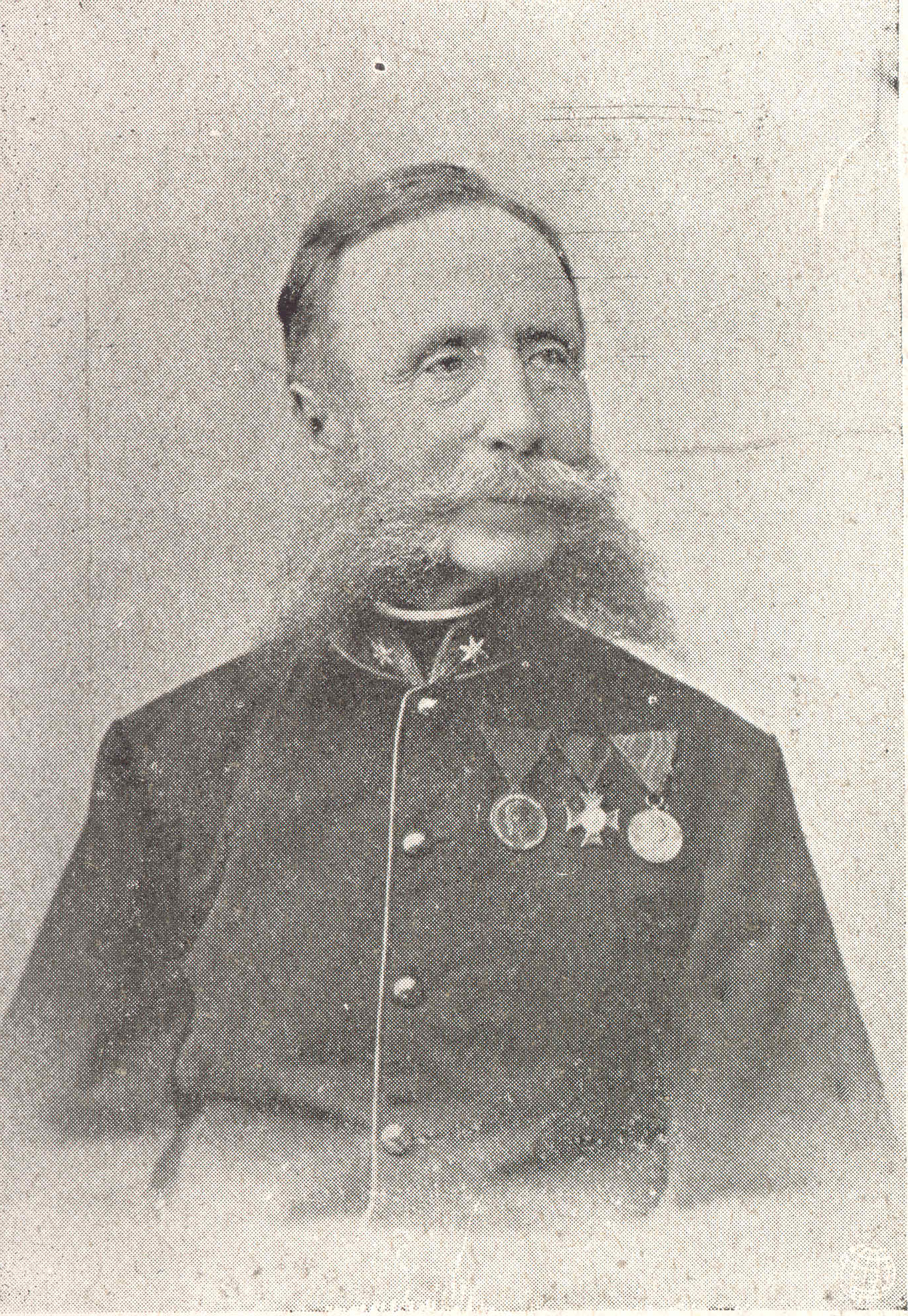 K.u.k. Major, Bergsteiger und Begründer des Karpathenvereins